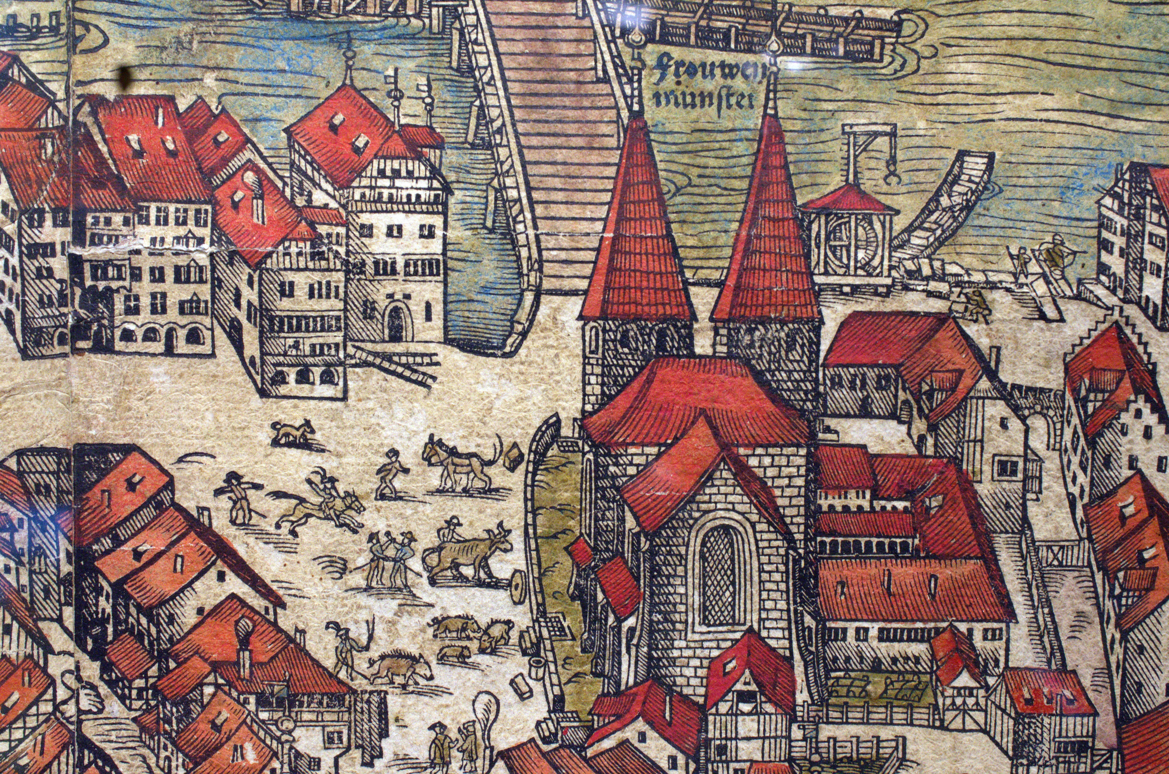 Münsterhof und Fraumünster auf dem kolorierten Murerplan im Baugeschichtlichen Archiv der Stadt Zürich im Haus zum Rech